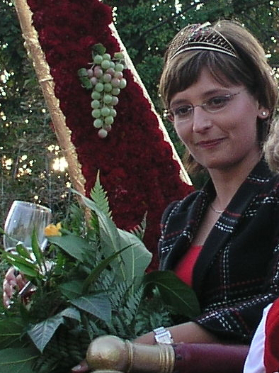 Bildausschnitt: Die Deutsche Weinkönigin 2005/2006, Sylvia Benzinger, beim Winzerfestzug in Neustadt an der Weinstraße